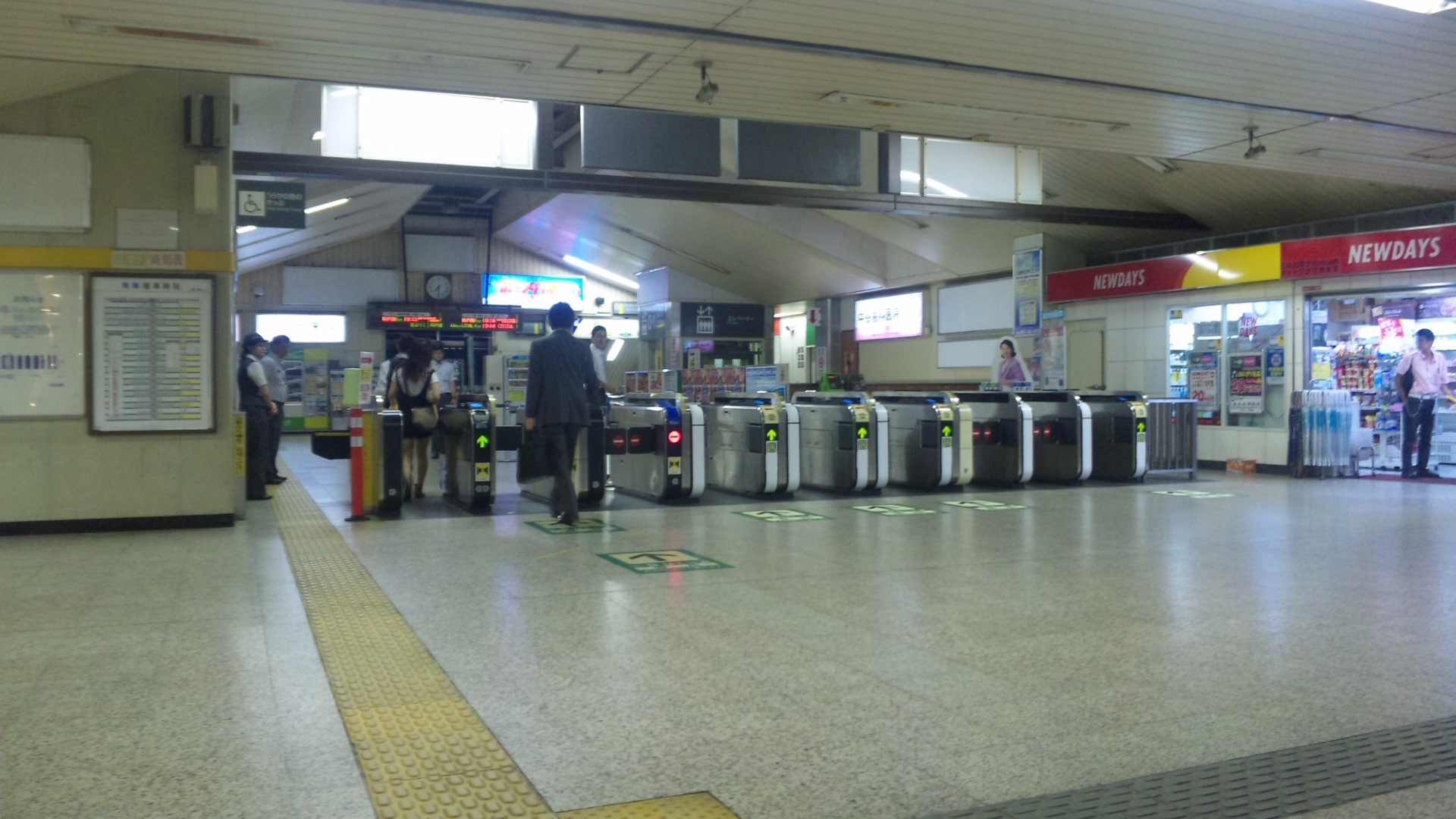 四街道駅改札